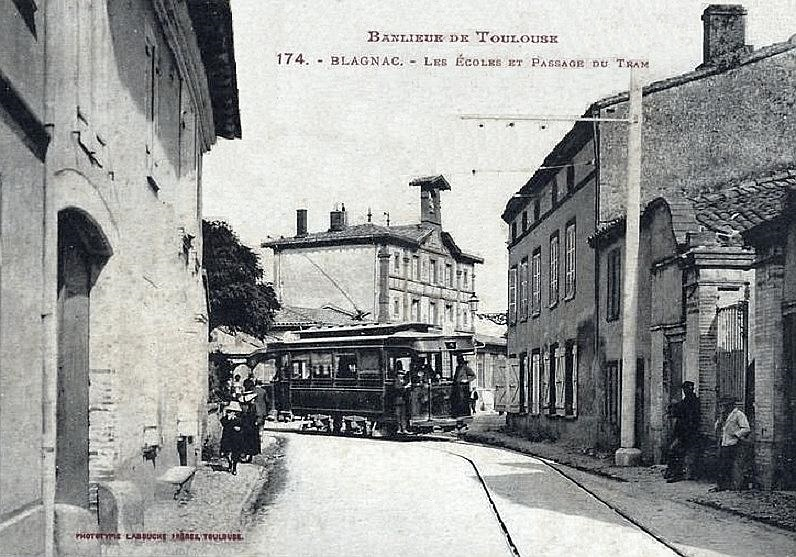 Blagnac - le tramway devant les écoles (1910).